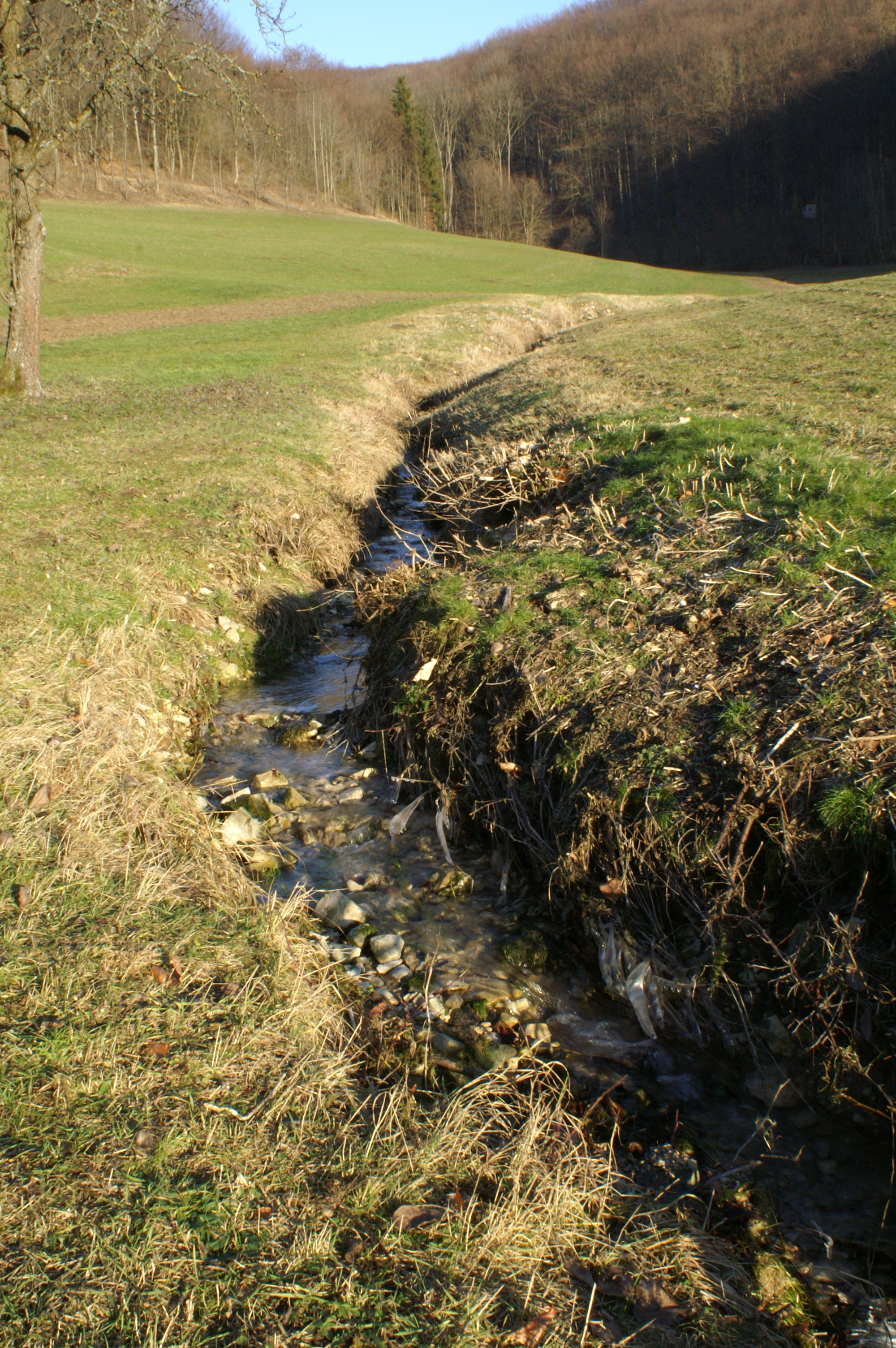 Die Lauter (Fils) entspringt oberhalb von Degenfeld im Ostalbkreis